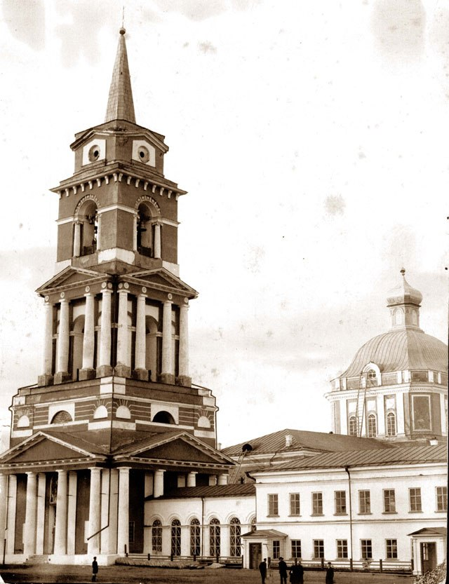 Кафедральный собор в Перми